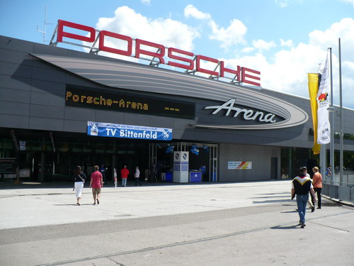 Eingang Porsche Arena in Stuttgart